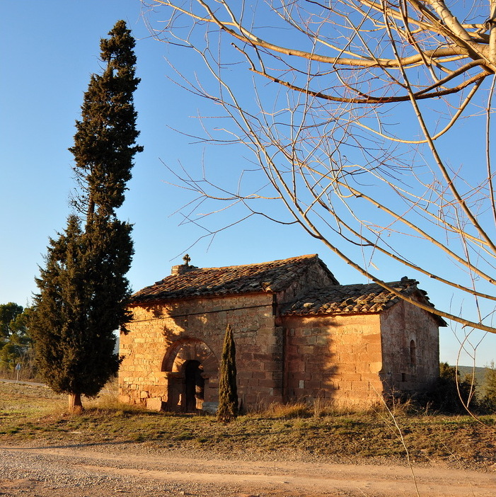 Façana de migdia